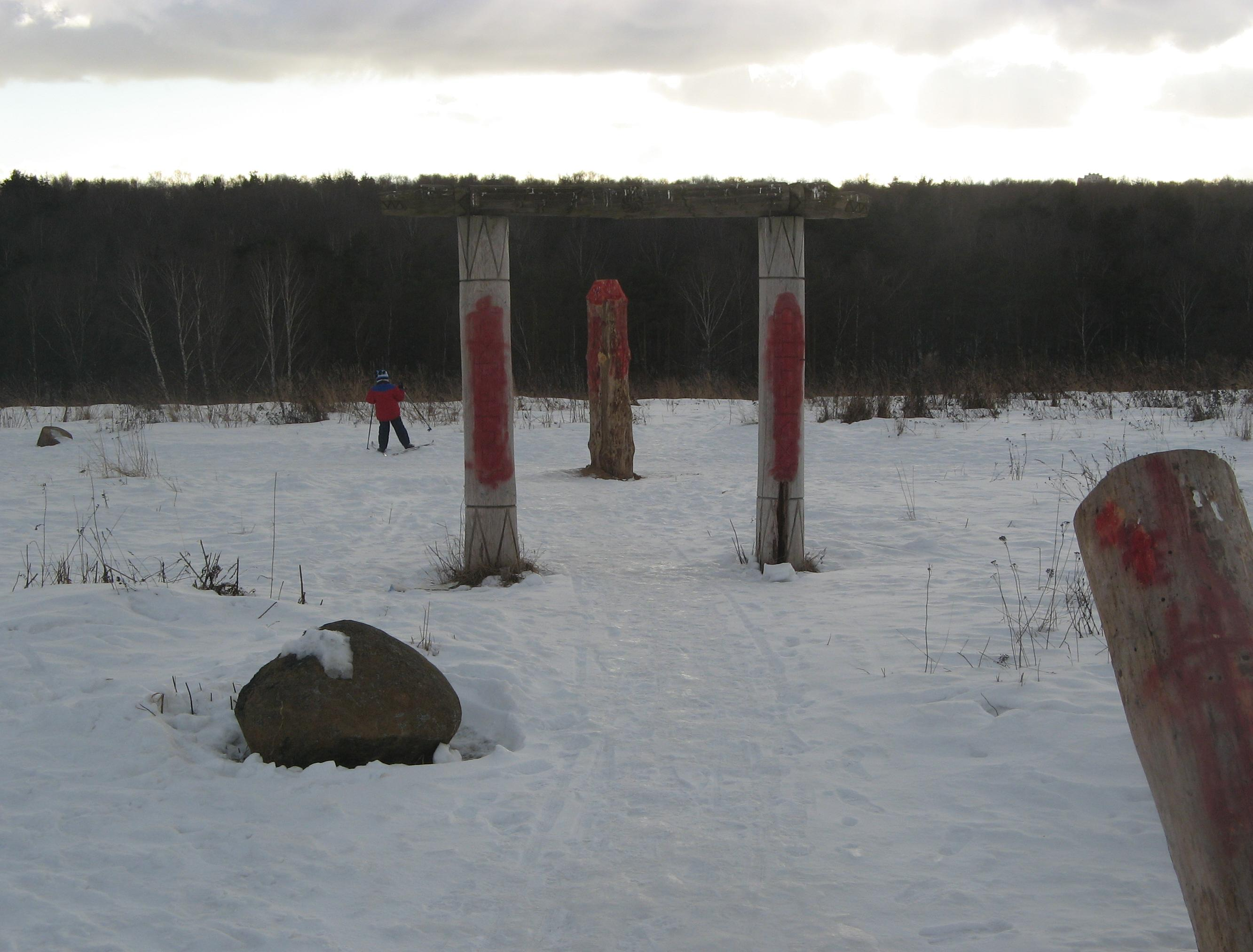 Лысая гора (Битцевский лес)